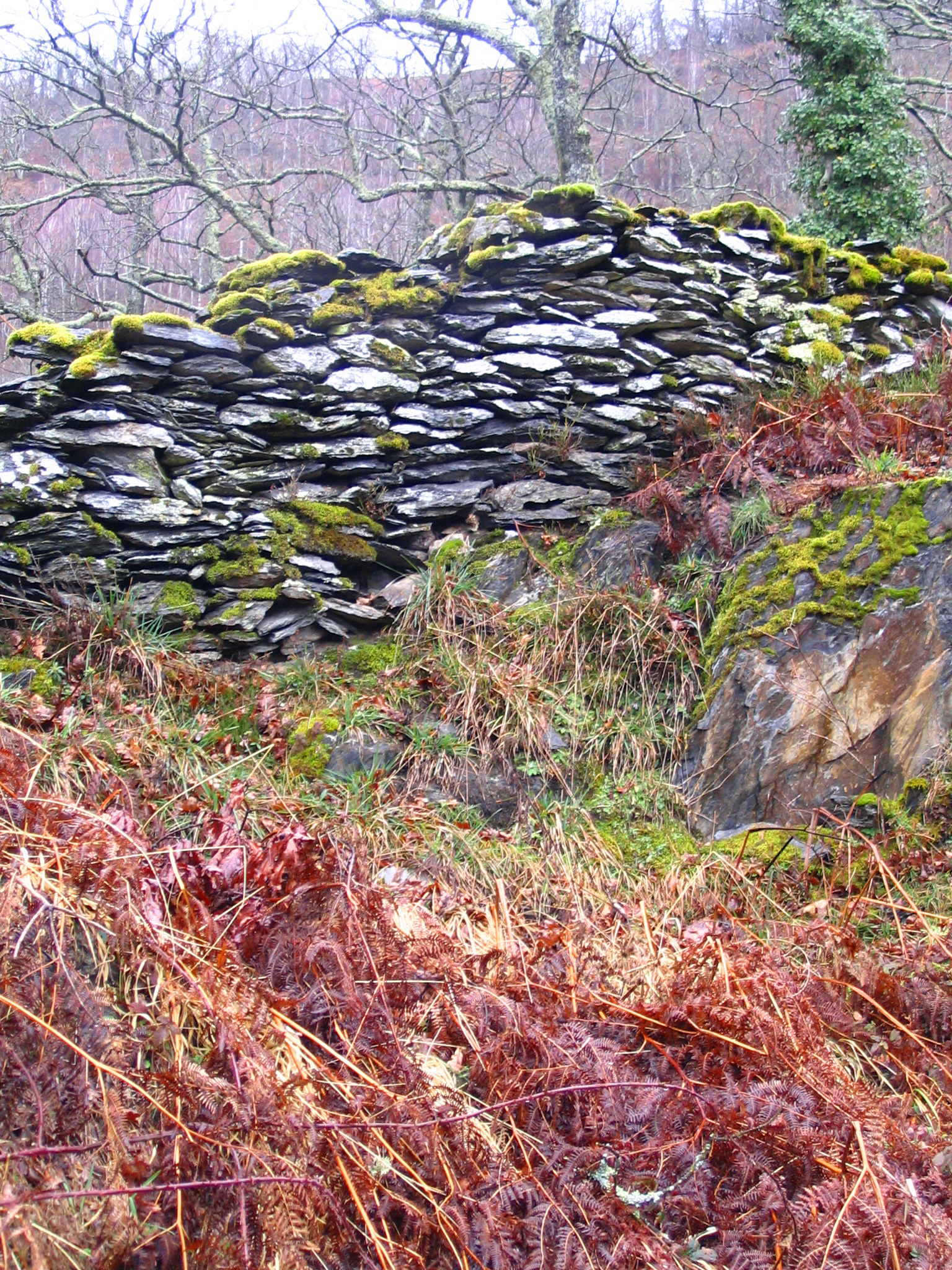 Muret de pierres sèches, Pyrénées, France